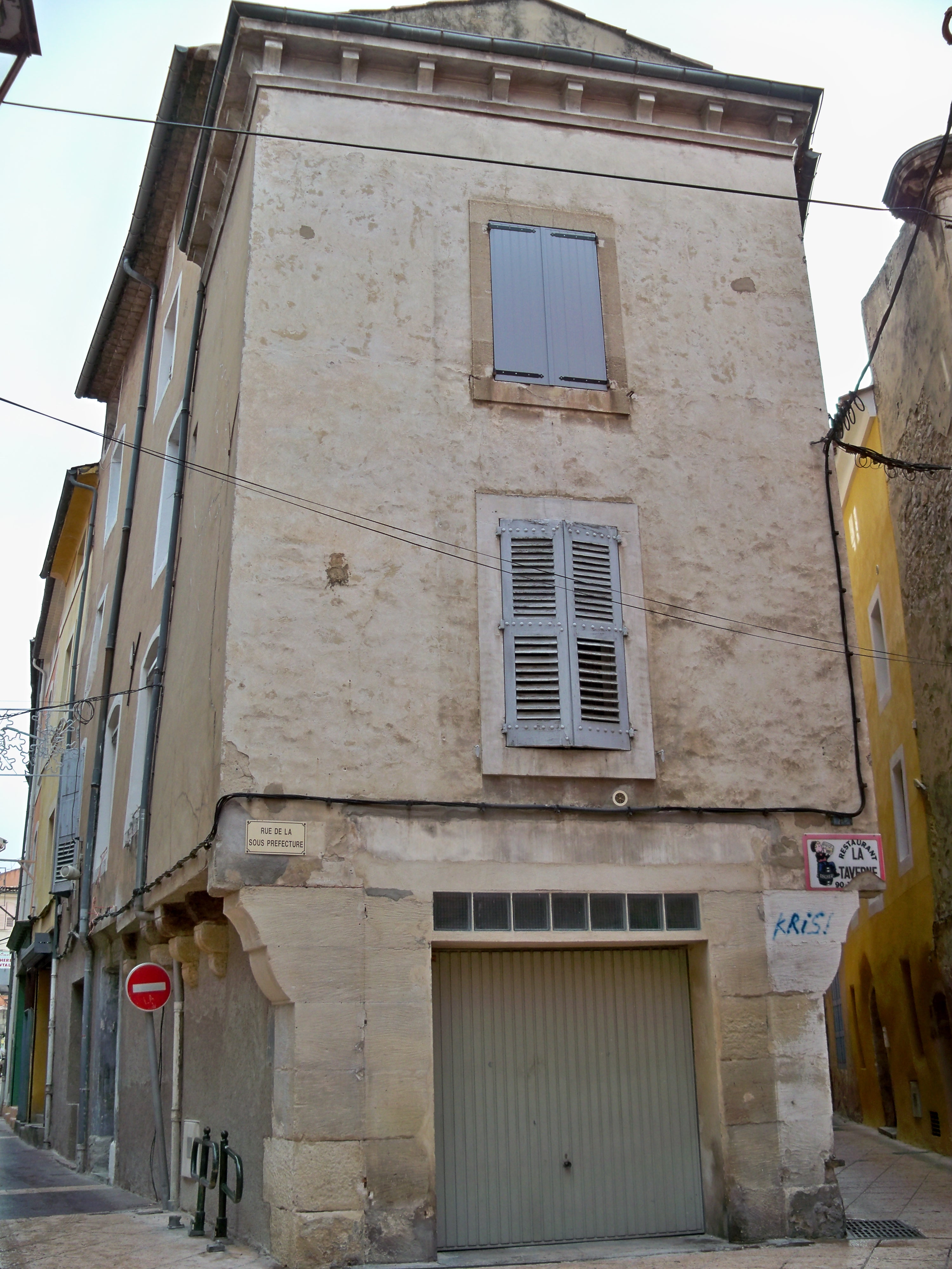 maison médiévale à Apt (Vaucluse, France)